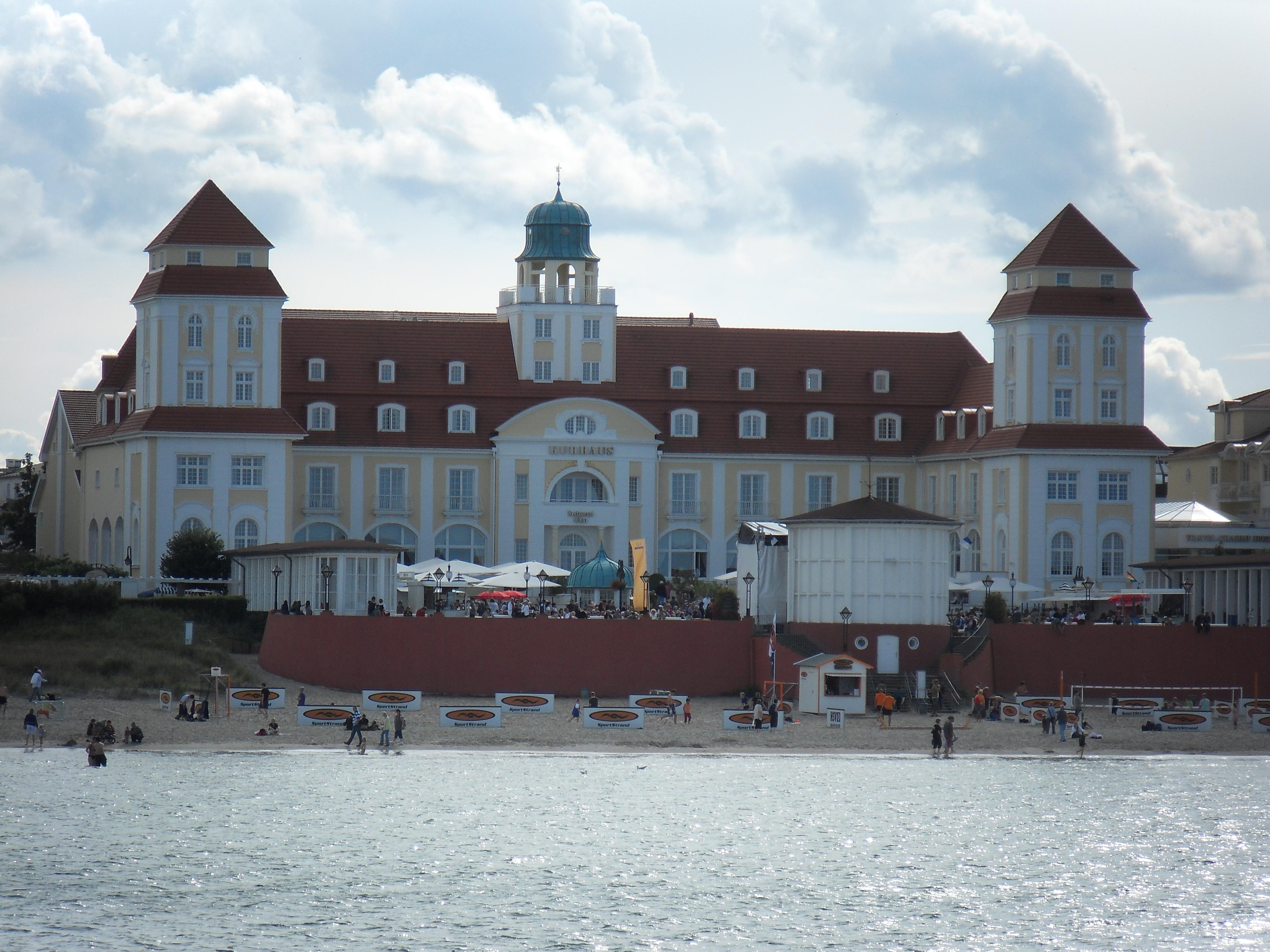 Kurhaus Binz von der Seebrücke aus fotografiert